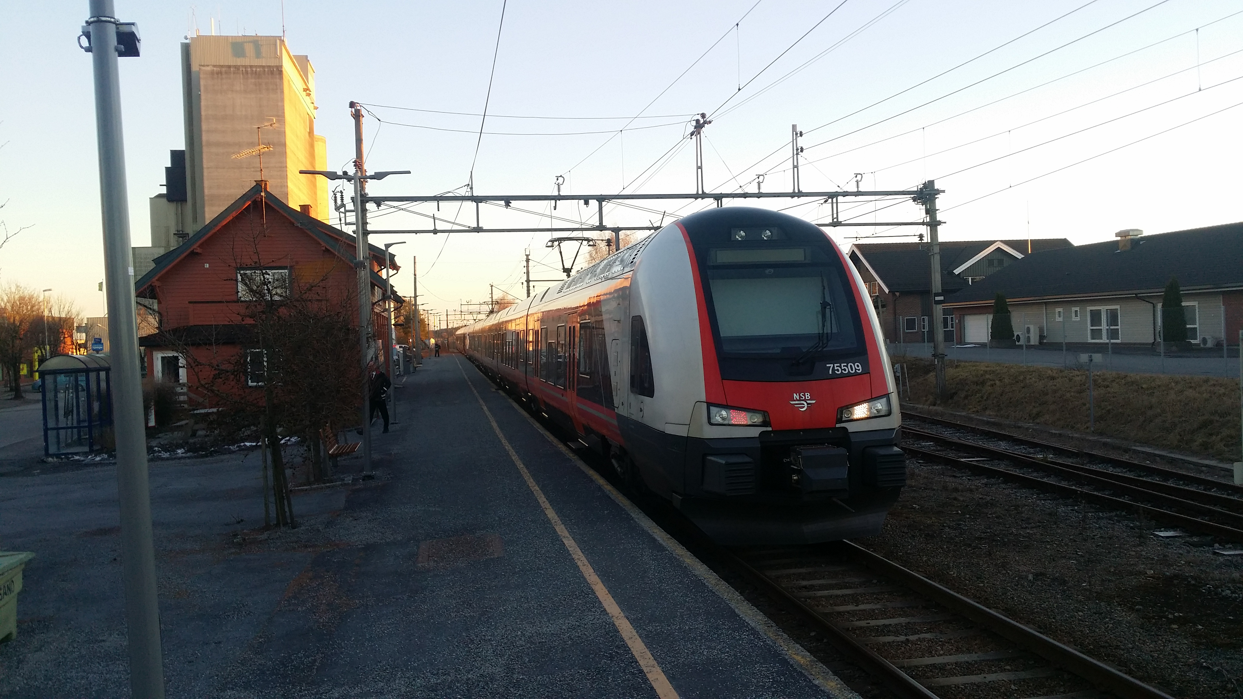 Rakkestad stasjon med tog.